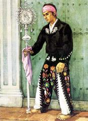 Atanasio Tzul, líder indígena de Totonicapán en Guatemala. Grabado de 1900